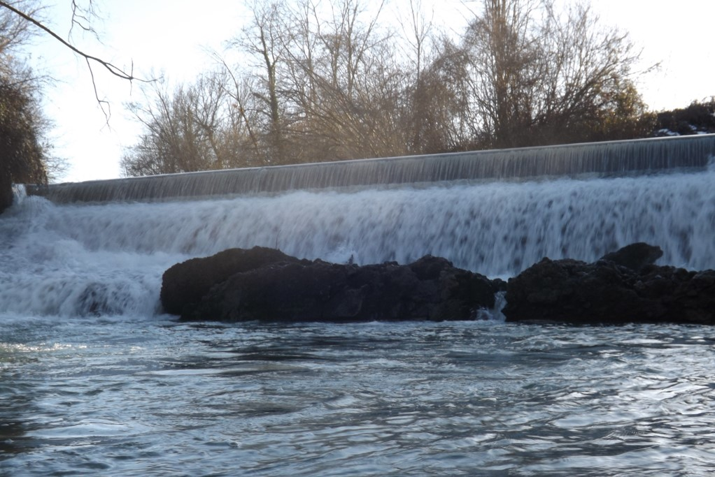 Digue sur la Baïse, à Montaut